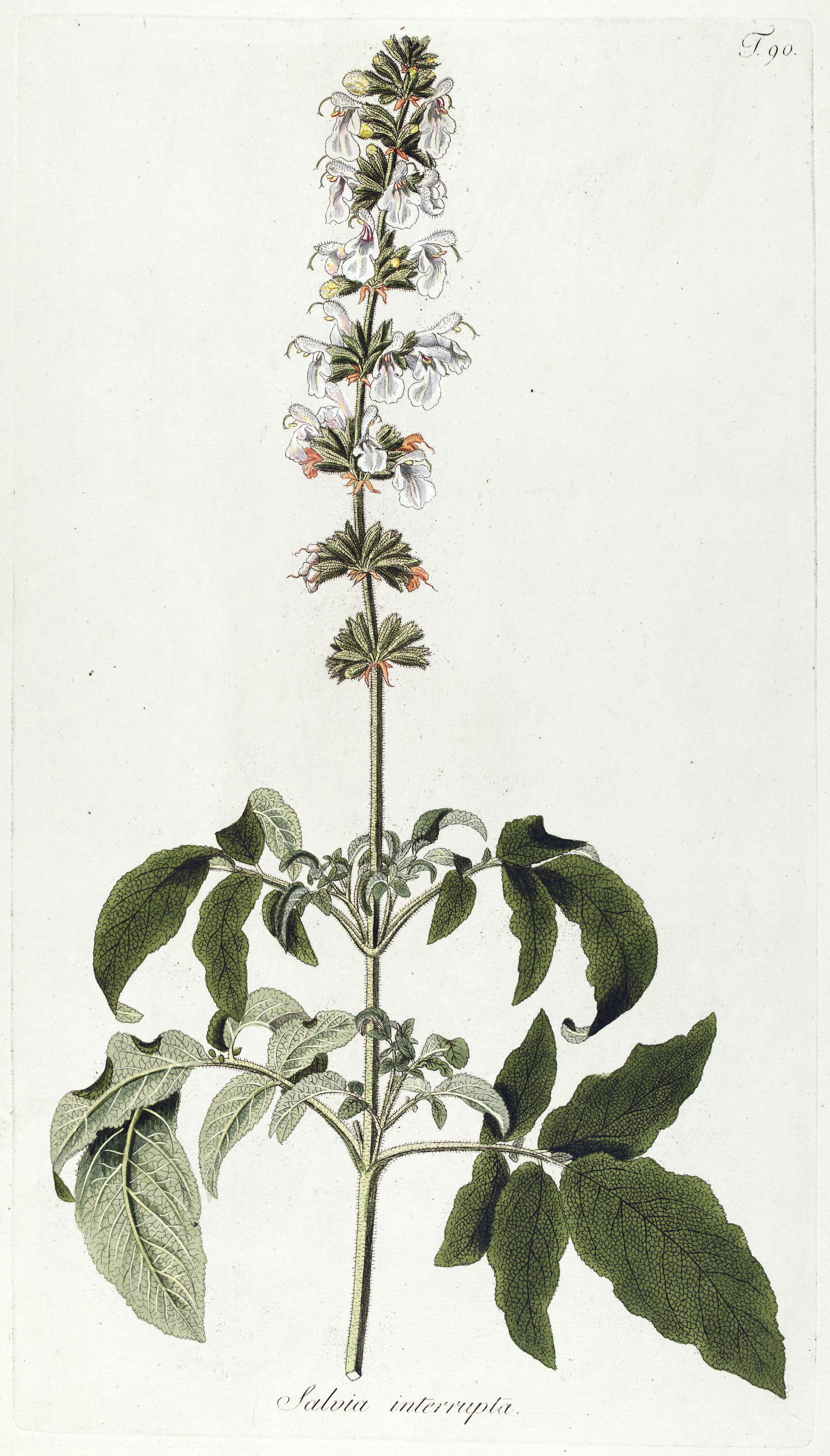 Fragmenta botanica, figuris coloratis illustrata :ab anno 1800 ad annum 1809 per sex fasciculos edita /opera et sumptibus Nicolai Josephi Jacquin.